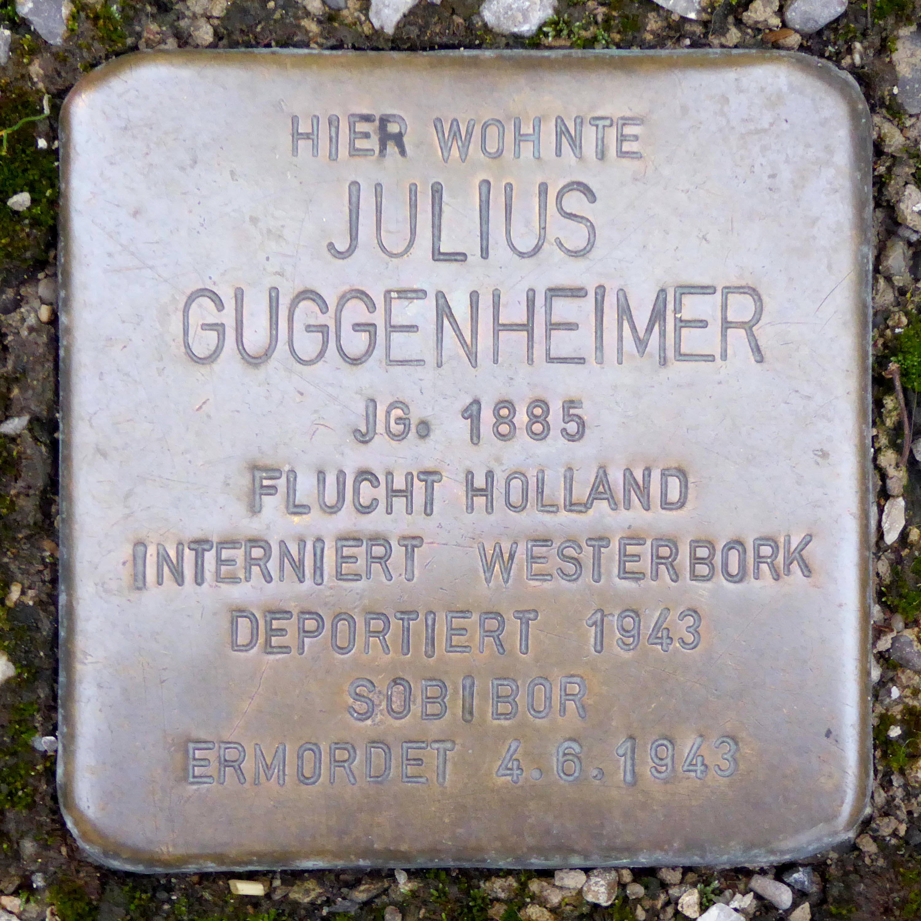 Stolperstein für Julius Guggenheimer (1885–1943) vor Kalchstraße 8 in Memmingen